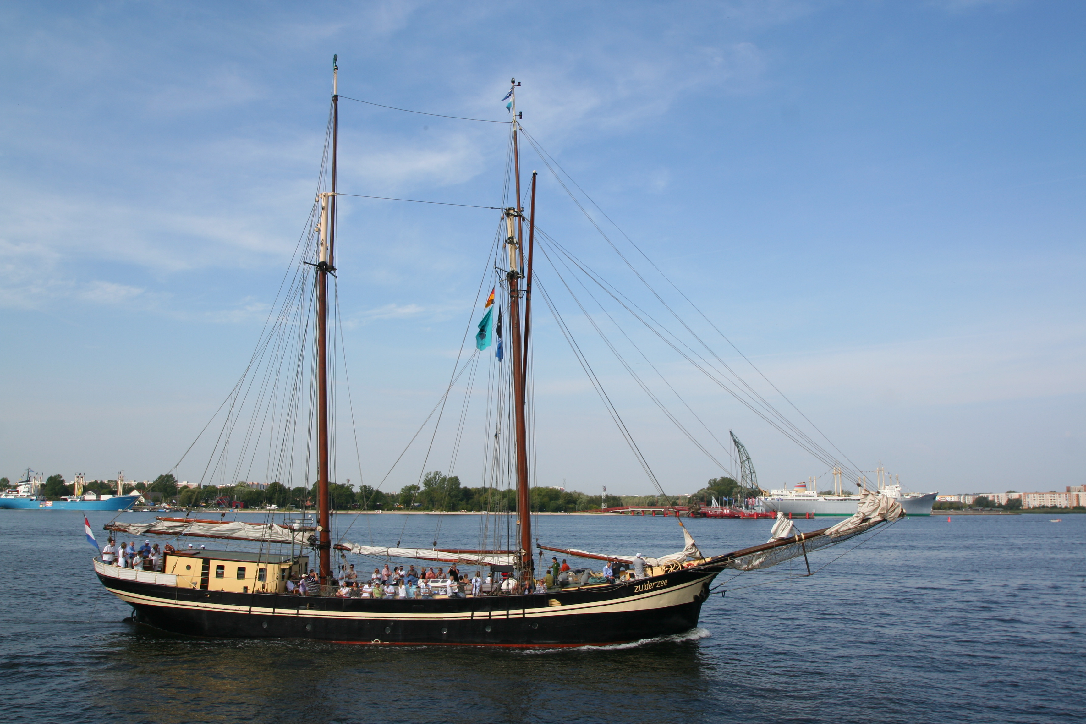 Das Segelschiff ‚Zuiderzee‘ bei der Hanse Sail 2009 in Rostock